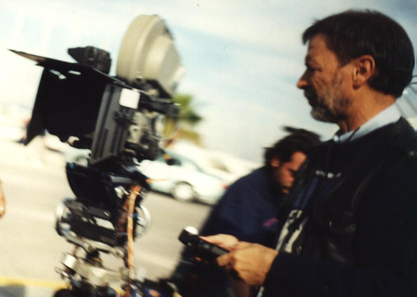 Al director de fotografia de son de mar